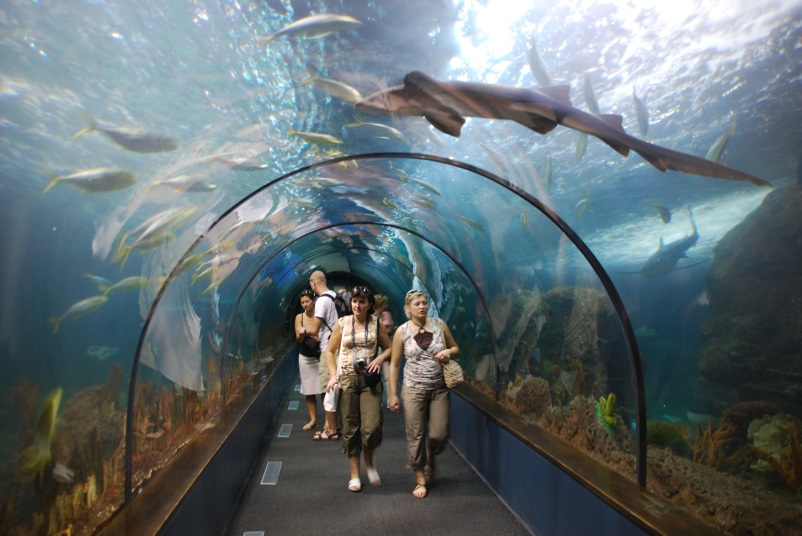 Haifischtunnel im Loro Parque